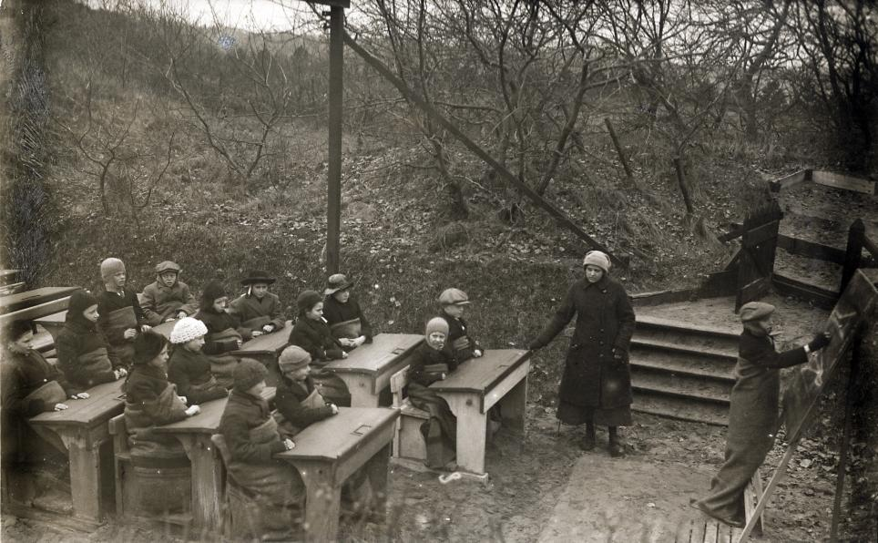 Nationaal Archief / Spaarnestad Photo / Het Leven, SFA022818969. Openluchtschool. Een klas leerlingen krijgt les met schoolborden en al buiten in de open lucht. Ze zijn dik bepakt om de kou te trotseren. Plaats onbekend, 1918. Open-air school in the freezing cold. The Netherlands, location unknown, 1918. Collectie Spaarnestad Voor meer informatie en voor meer foto’s uit de collectie van Spaarnestad Photo, bezoek onze Beeldbank: U kunt ons helpen onze kennis van de fotocollecties te verrijken door tags en commentaren toe te voegen. Herkent u mensen of locaties of heeft u een bijzonder verhaal te vertellen bij één van de foto’s, laat dan een reactie achter (als u ingelogd bent bij Flickr) of stuur een mailtje naar: You can help us gain more knowledge on the content of our collection by simply adding a comment with information. If you do not wish to log in, you can write an e-mail to